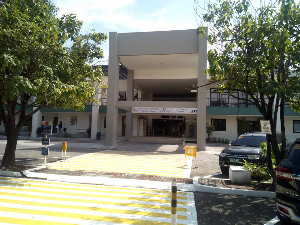 Blick über den Parkplatz auf den Eingangsbereich der deutschen und französischen Schule in Manila